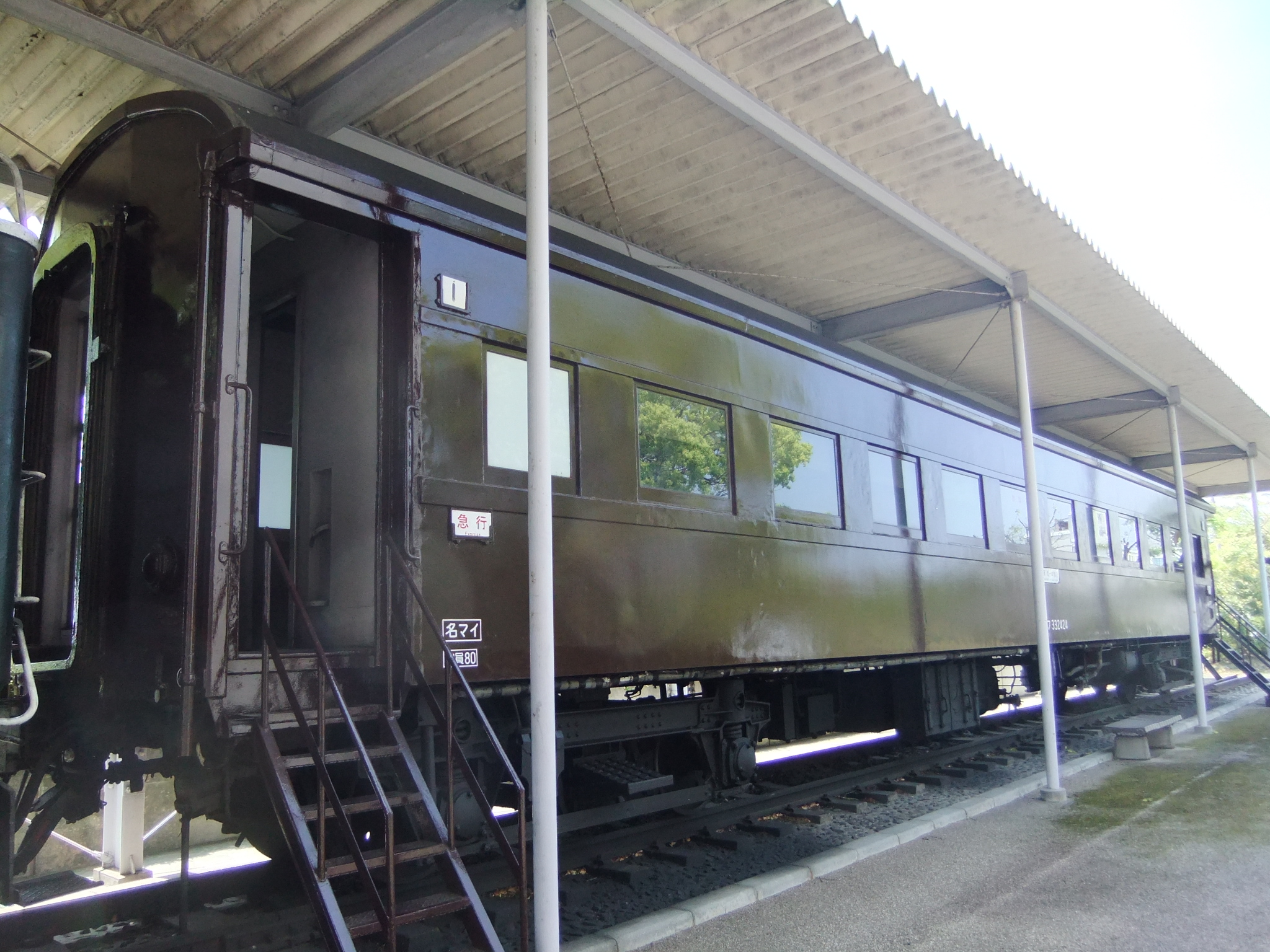 オハフ33 2424 蒲郡市郷土資料館